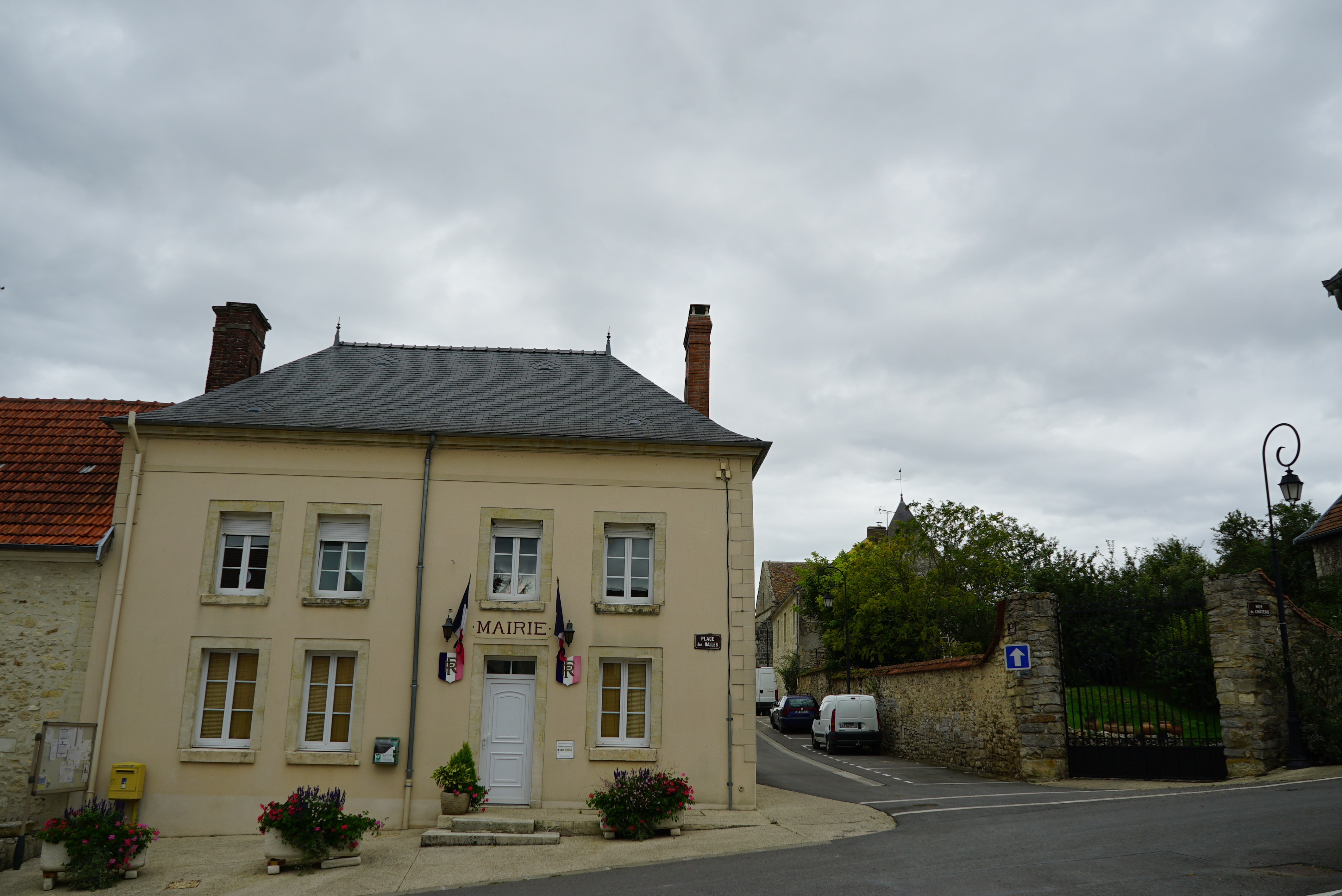 vue de Lagery